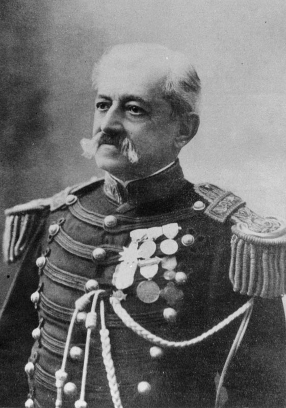 Fotografia tomada al General Eduardo Gustavo Pico